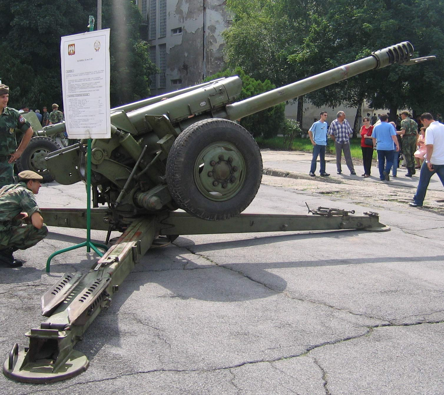 Haubica 122mm D-30J